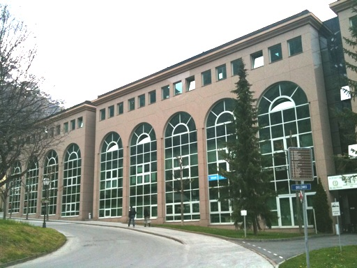 Lindner Alpentherme in Leukerbad, Kanton Wallis